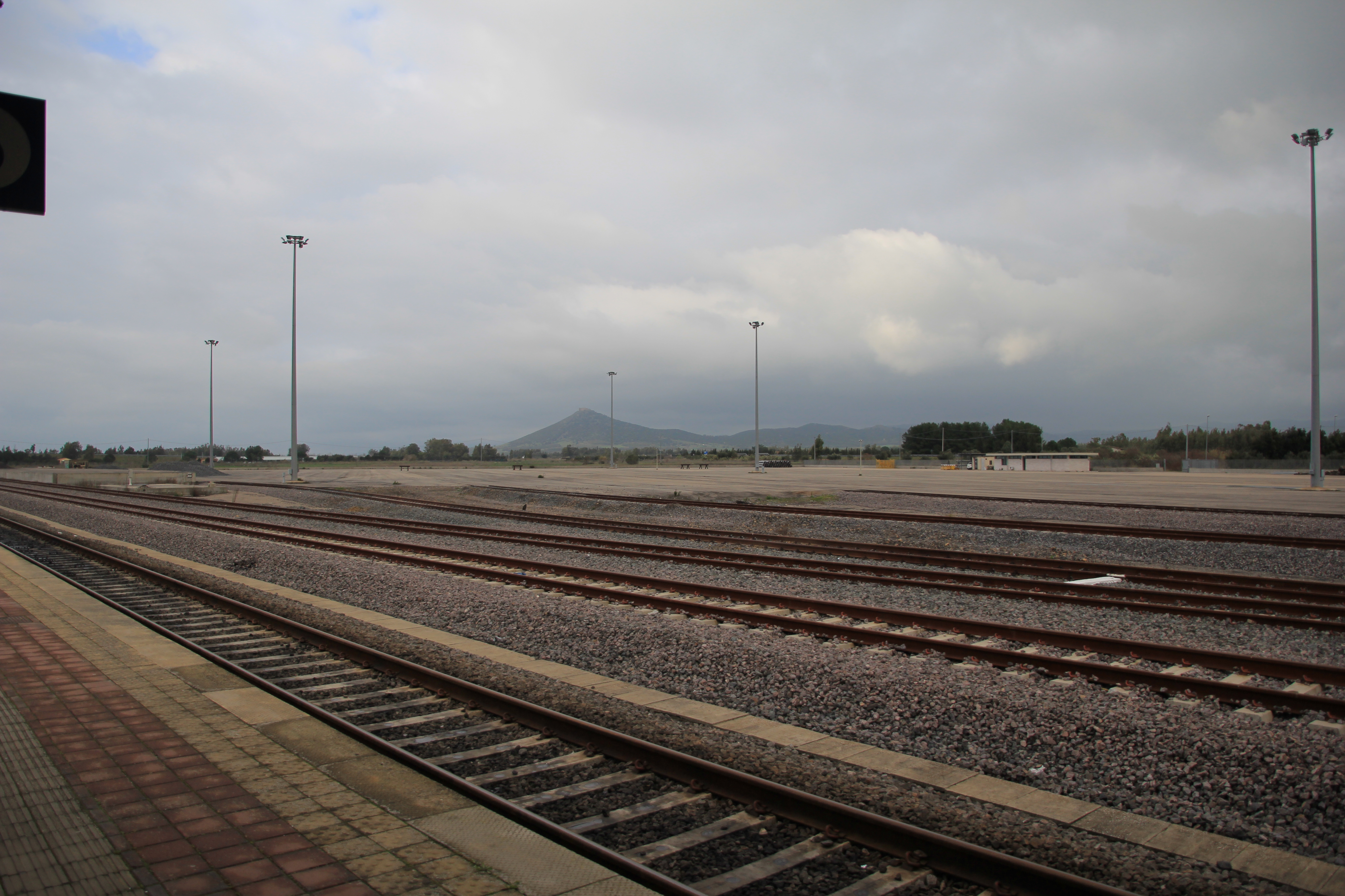 San Gavino Monreale - Stazione ferroviaria